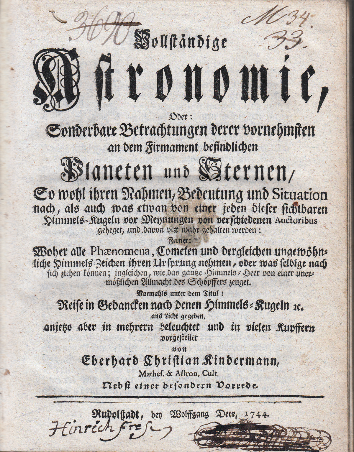 Titelansicht des Buches Vollständige Astronomie, oder Sonderbare Betrachtungen derer vornehmsten an dem Firmament befindlichen Planeten und Sterne von Eberhard Christian Kindermann, Rudolstadt 1744